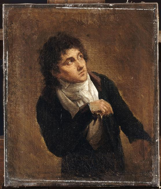 Louis-Léopold Boilly (1761–1845): Der Schauspieler François-Joseph Talma (1763–1826). Palais des Beaux-Arts de Lille. Photo (C) RMN-Grand Palais / Thierry Le Mage.